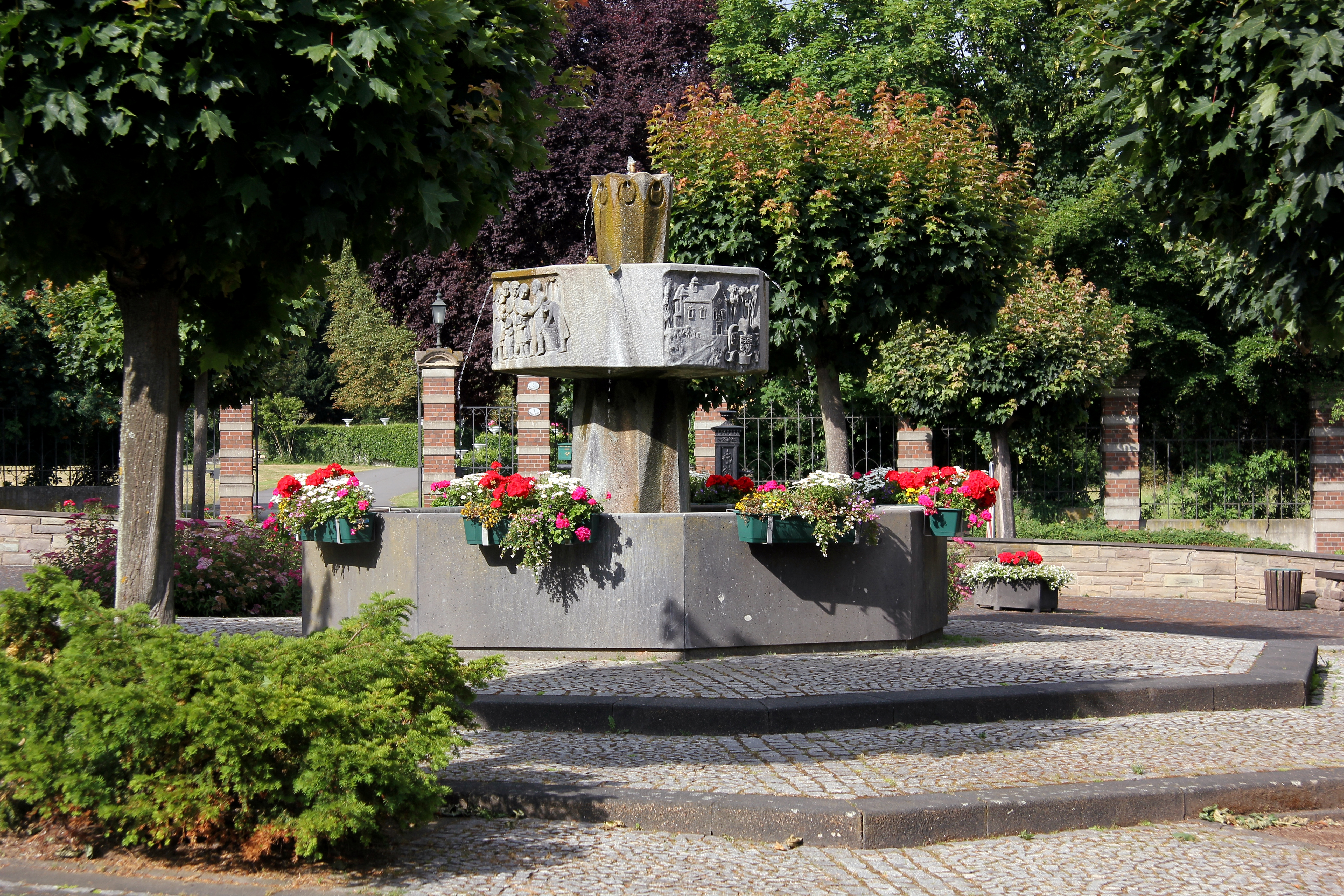 Bassenheim, Brunnen von Paul Milles auf dem Walpotplatz